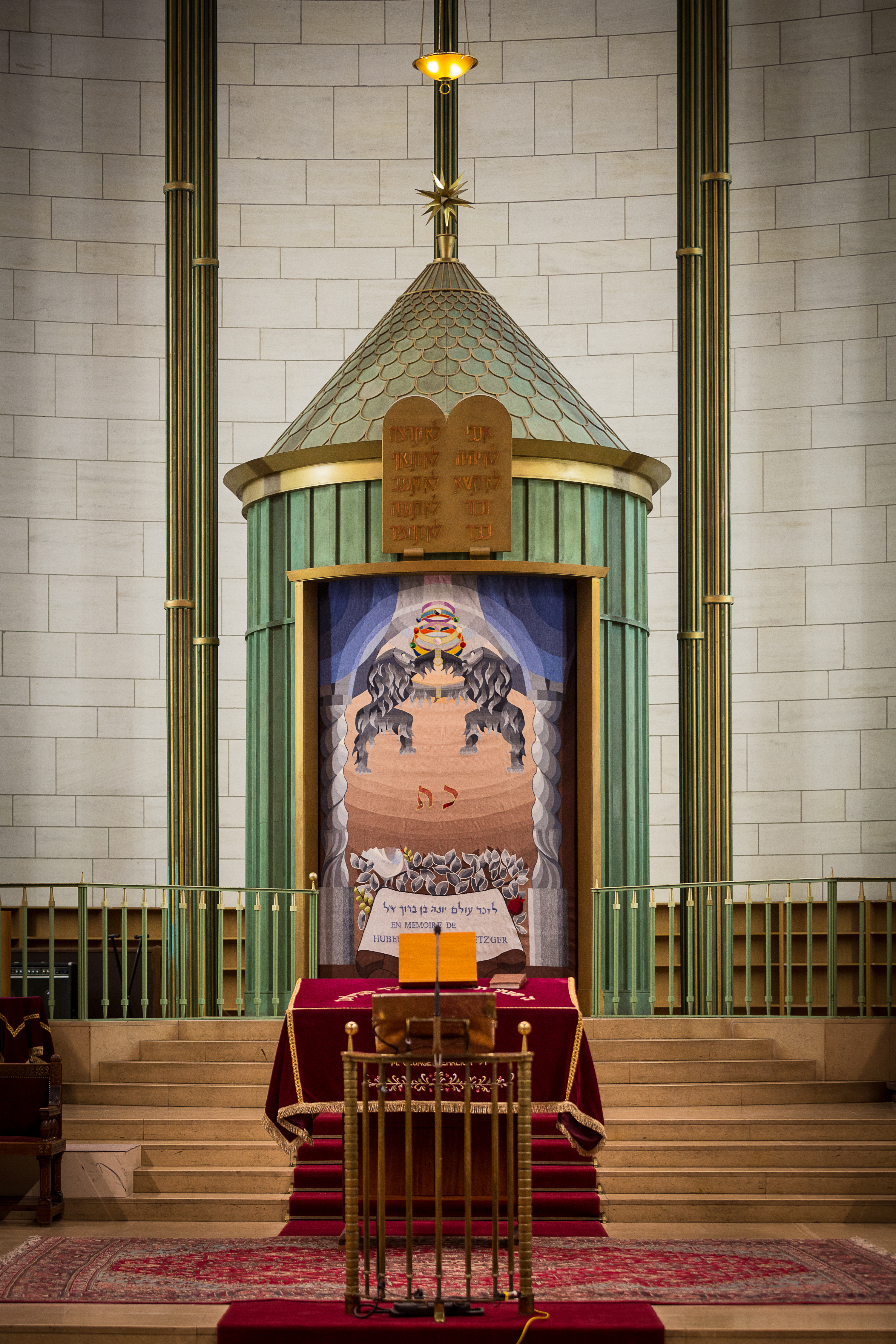 36e rencontres internationales de Taizé Strasbourg 28 décembre 2013